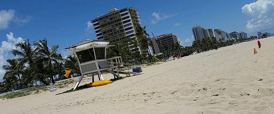 Beach in Fort Lauderdale, Florida.